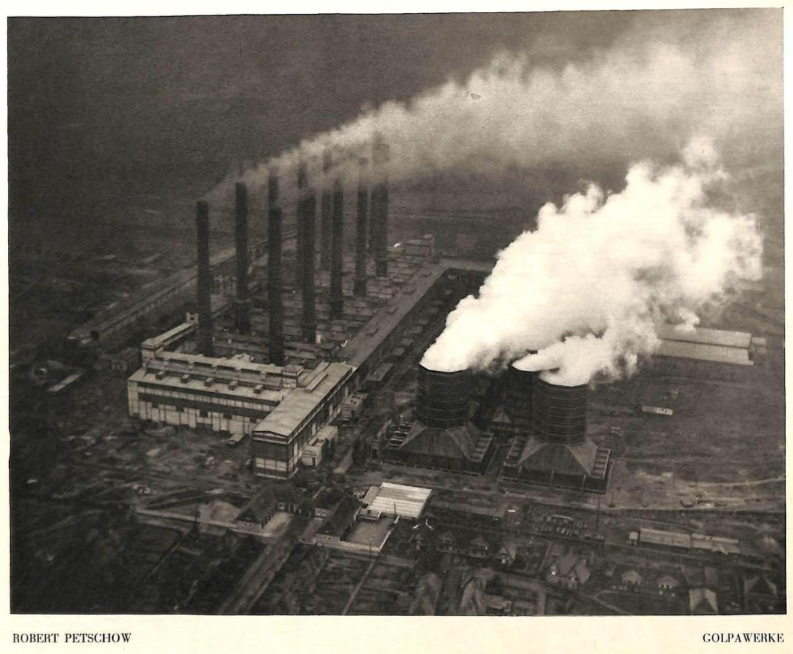 Golpa-Werke von oben, 1926/27. Foto von Robert Petschow. (Aus einem Ballon aufgenommen)